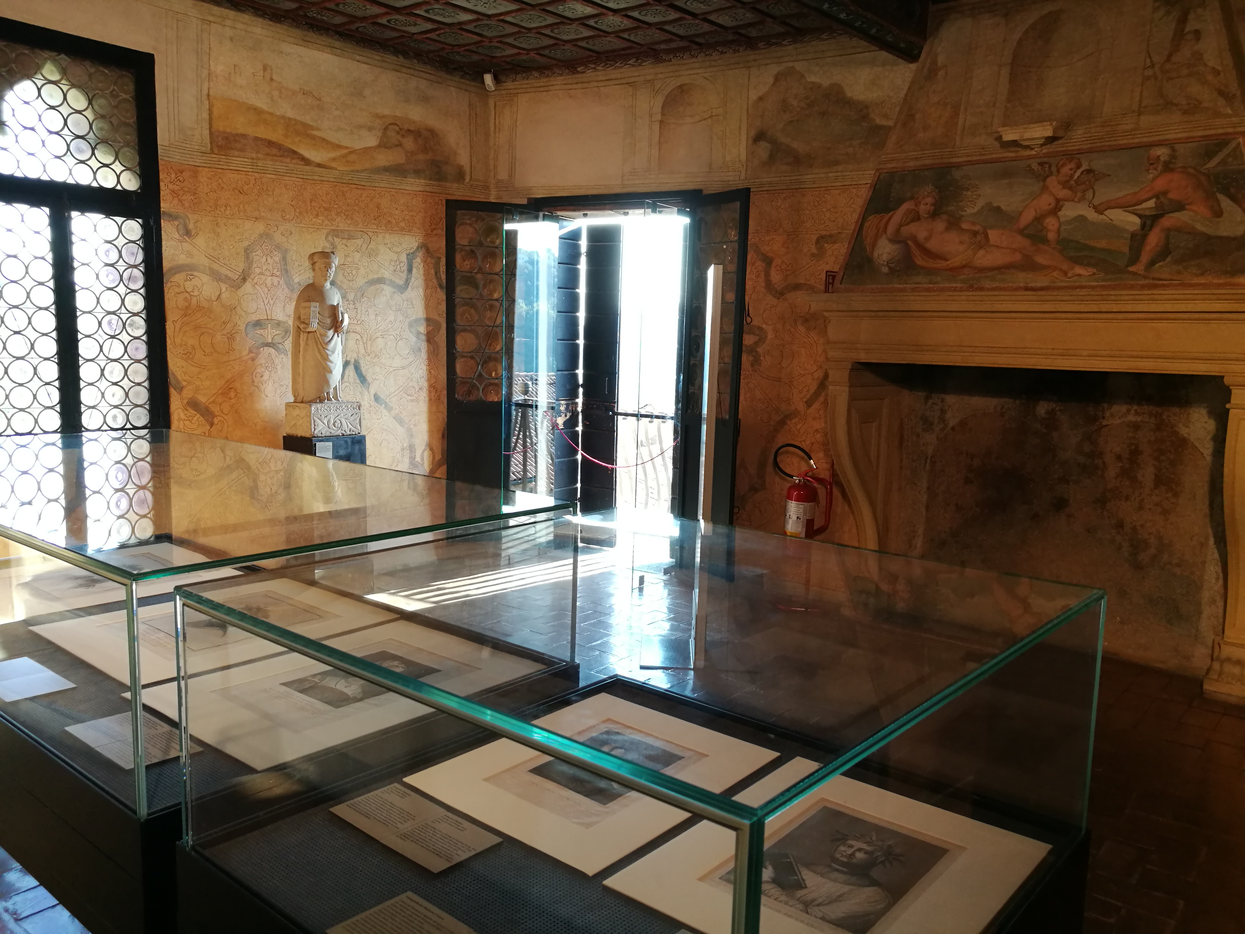 casa del Petrarca This is a photo of a monument which is part of cultural heritage of Italy.